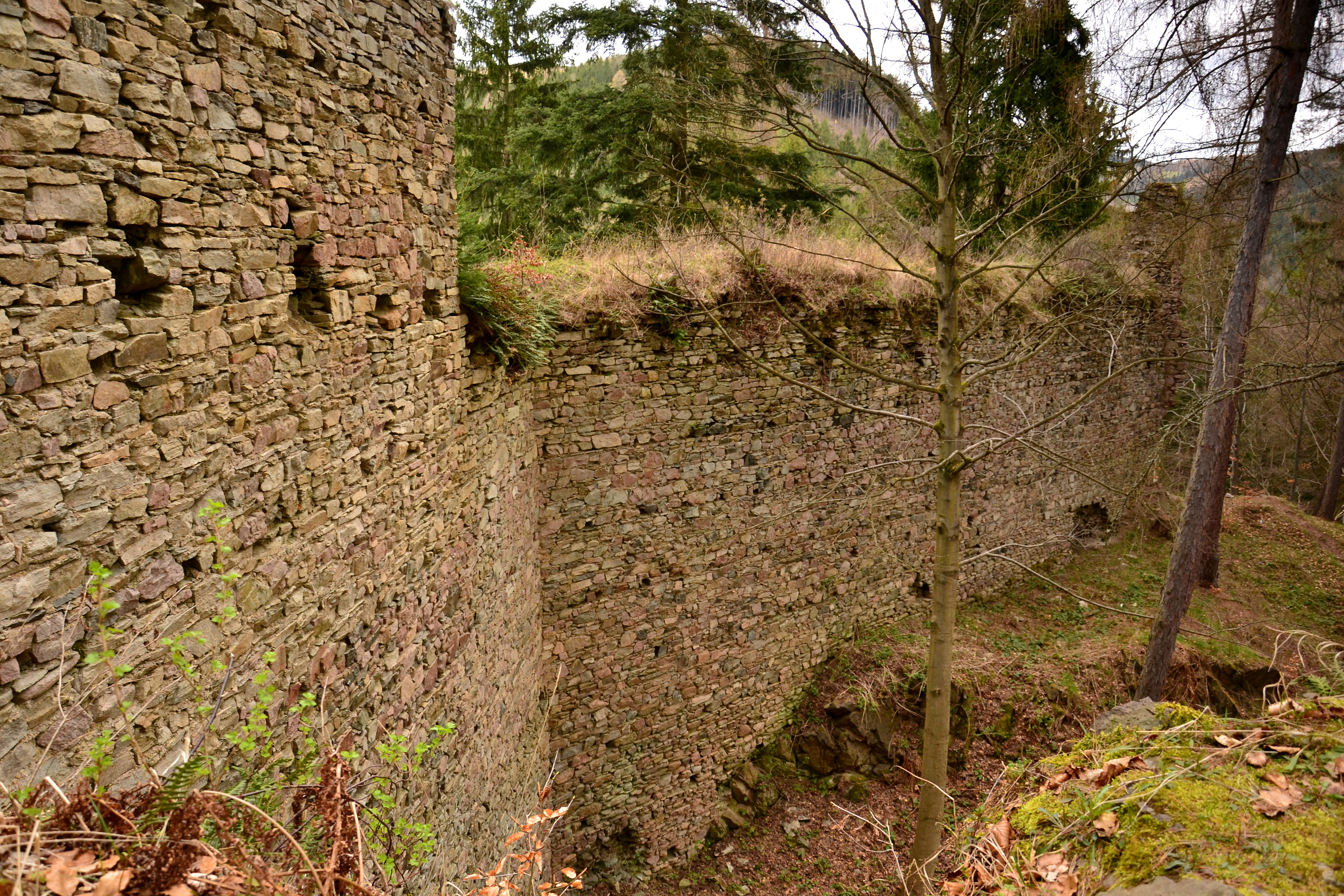 Hradba prvního nádvoří